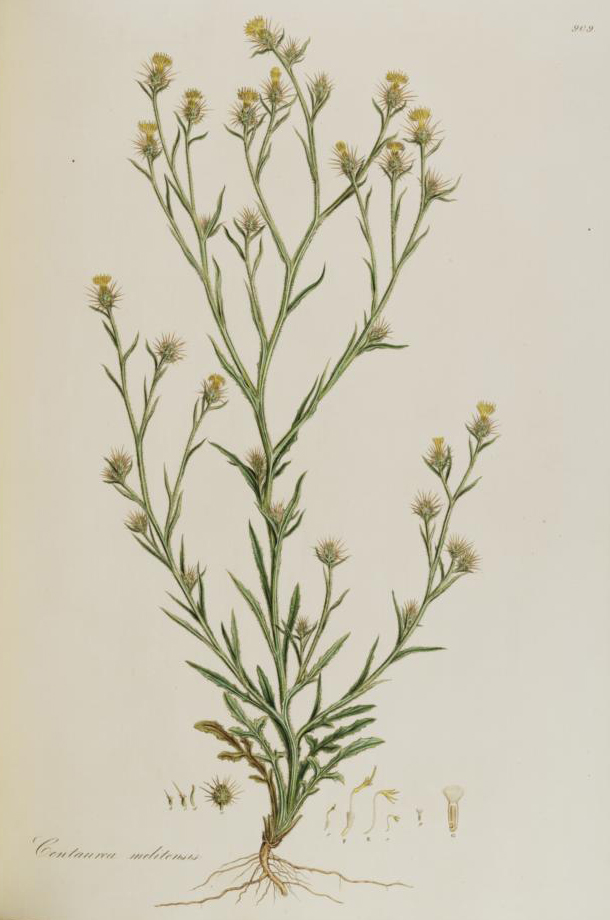 Legende: a Hülle (x1). b, c, d Hüllblatt (x1). e Äußere Röhrenblüte (x1). E Äußere Röhrenblüte (vergr.). f Innere Röhrenblüte (x1). F Innere Röhrenblüte (vergr.). g Frucht (x1). G Frucht (vergr.).